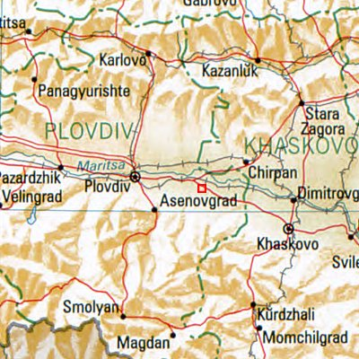 Parwomai - Lage des Ortes in Bulgarien